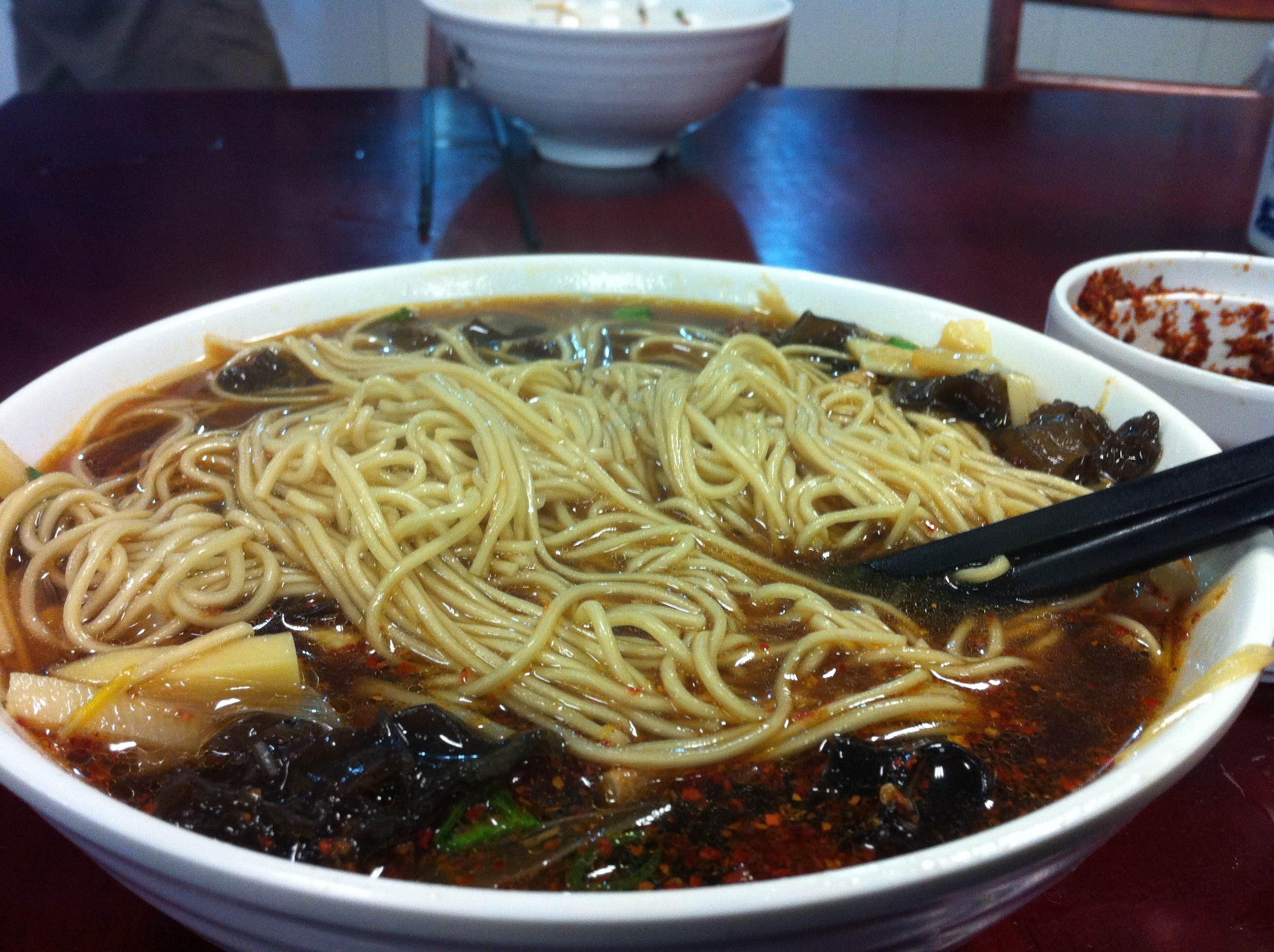 中文（中国大陆）: 一碗苏式汤面，浇头是香菇和素交。